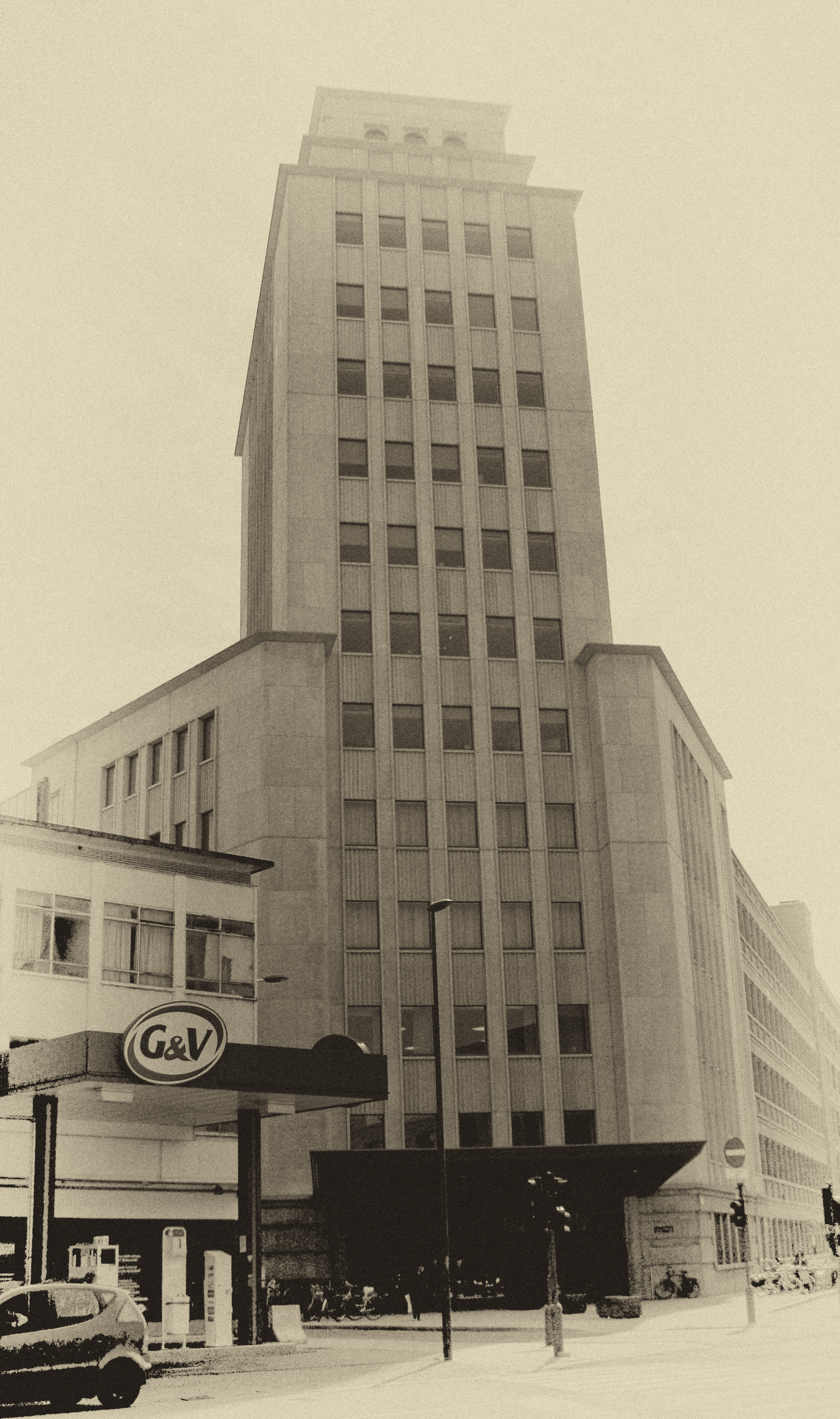 Den Bell; administratief centrum van de stad Antwerpen. Voorheen Bell Telephone Manufacturing Company